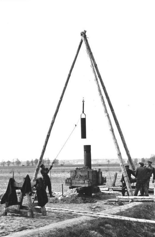 Brunnenbauer Illus-Erich O. Krueger [Sowjetische Besatzungszone 1947] Brunnenbauer bei der Arbeit. Jeder Neubauer braucht für seinen Besitz einen Brunnen. 536-47